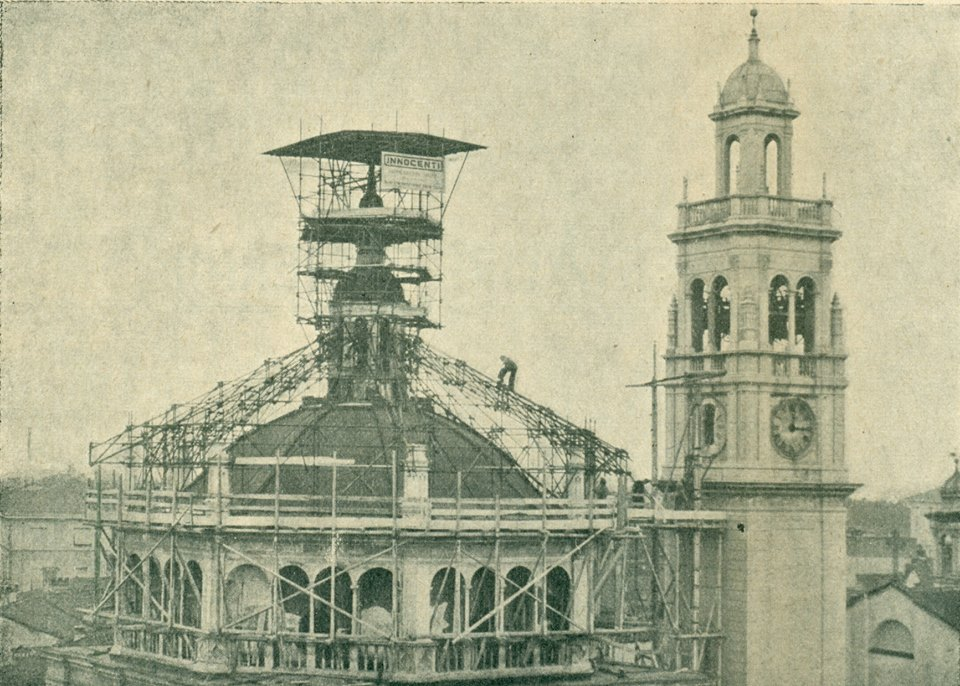 La cupola di del Santuario di Santa Maria di Piazza di Busto Arsizio durante i restauri del 1939-42.